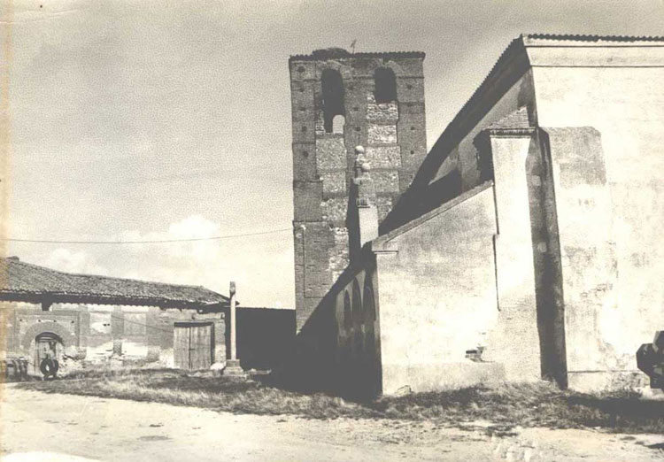 Iglesia de San Pedro - Aguasal (Valladolid) - Fotografía 104 x 73 B/N